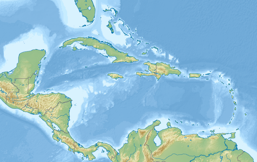 Физическая карта Вест-Индии. GMT coords: -R-93/-58/7/28